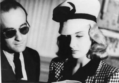 Luis Saslavsky junto a Mirtha Legrand leyendo el guion durante un alto en el rodaje de la película Cinco besos